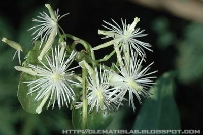 Clematis formosana Kuntz. ?????